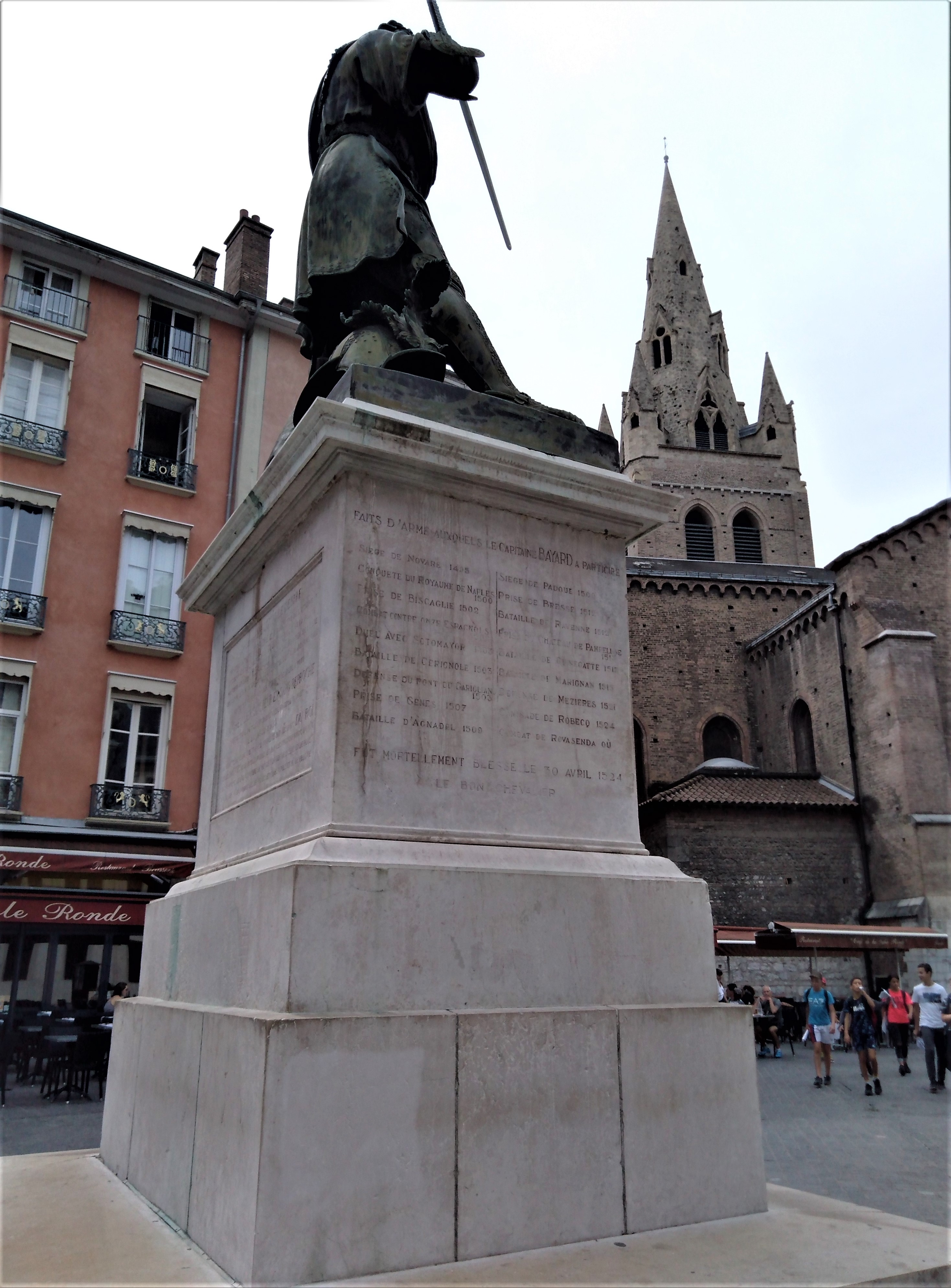 Statue de Bayard vue de trois quart arrière